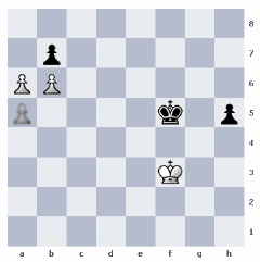 Jde o znázornění oběti pěšce za účelem získaní volného, rozhodujícího pěšce.